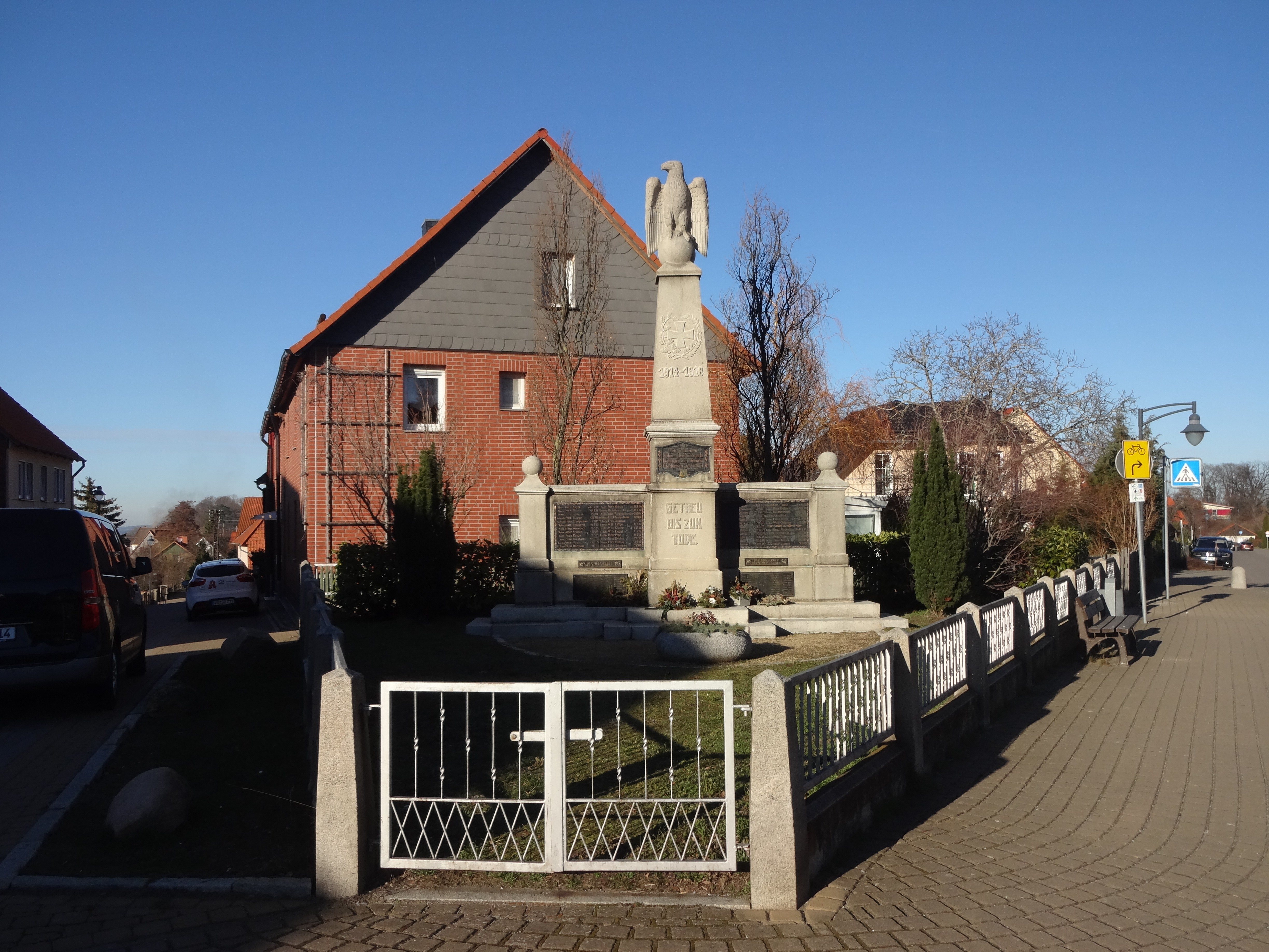 Kriegerdenkmal für die Gefallenen des Ersten Weltkriegs in der Straße der Republik in Darlingerode